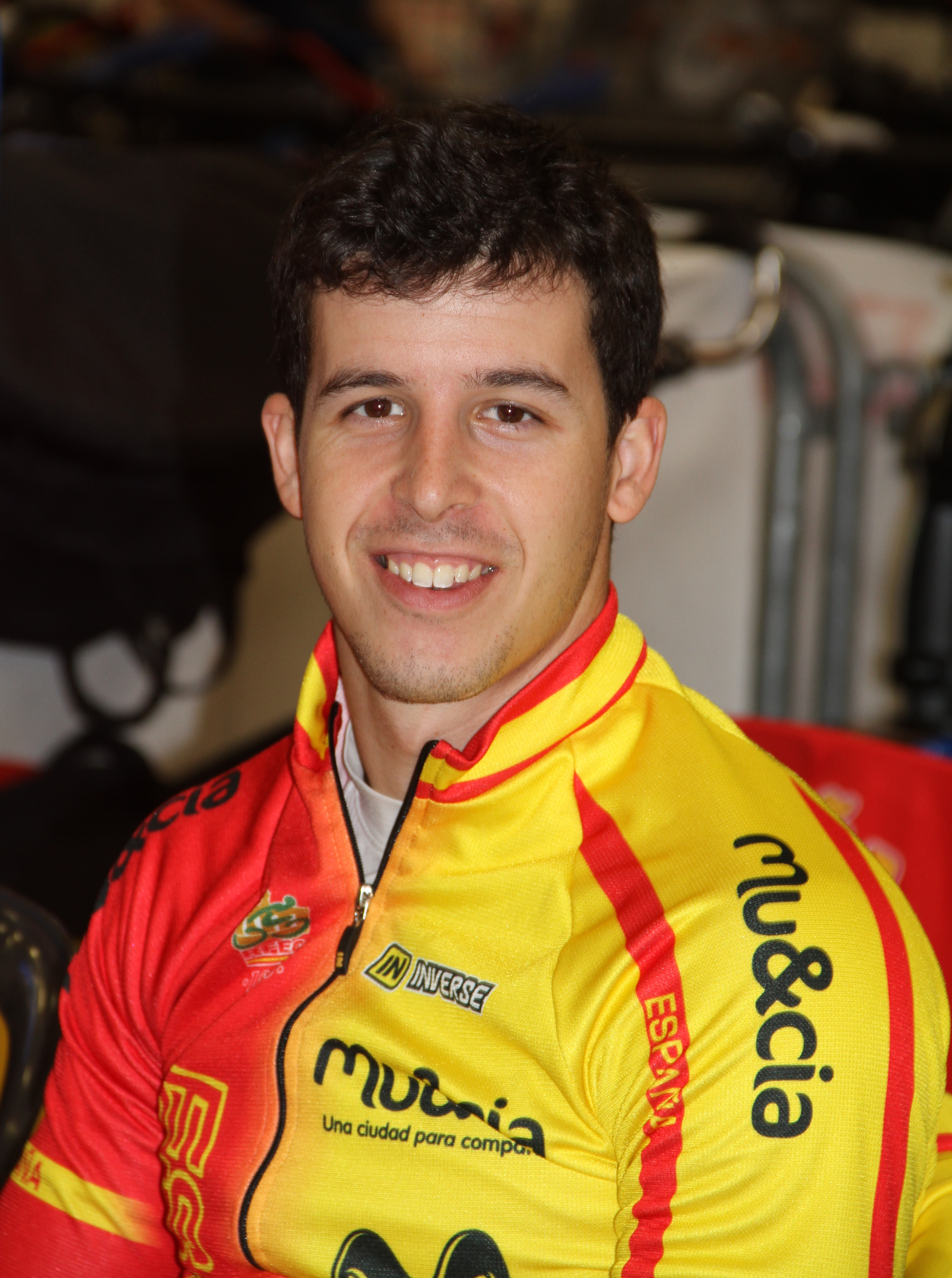 Sergio Aliaga Chivite, spanischer Radsportler The making of this document was supported by the Community-Budget of Wikimedia Germany.